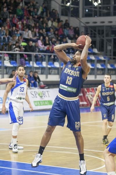 Johnson with the BC Yambol in 2014